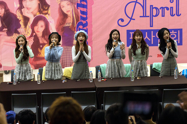 코엑스 스타필드 라이브플라자 B1 에이프릴(April) 팬사인회